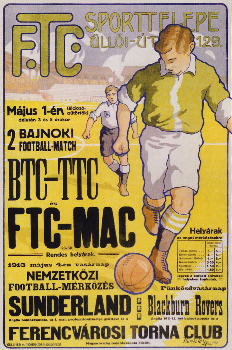 FTC-MAC labdarúgó mérkőzéd plakátja